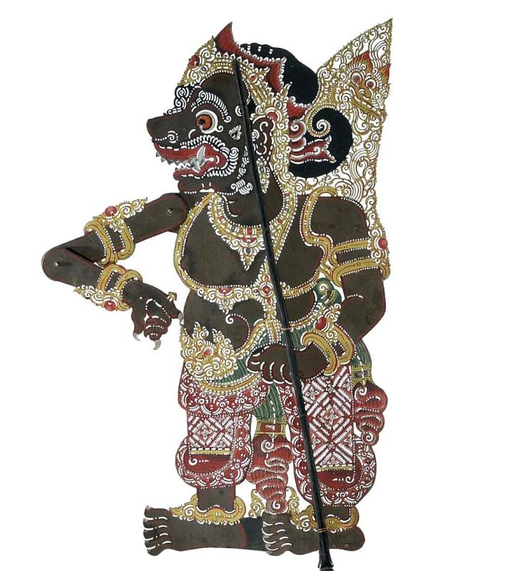 Schaduwfiguur. Wajangpop van karbouwenhuid, voorstellende Prahasta Unknown language: Wayang kulit